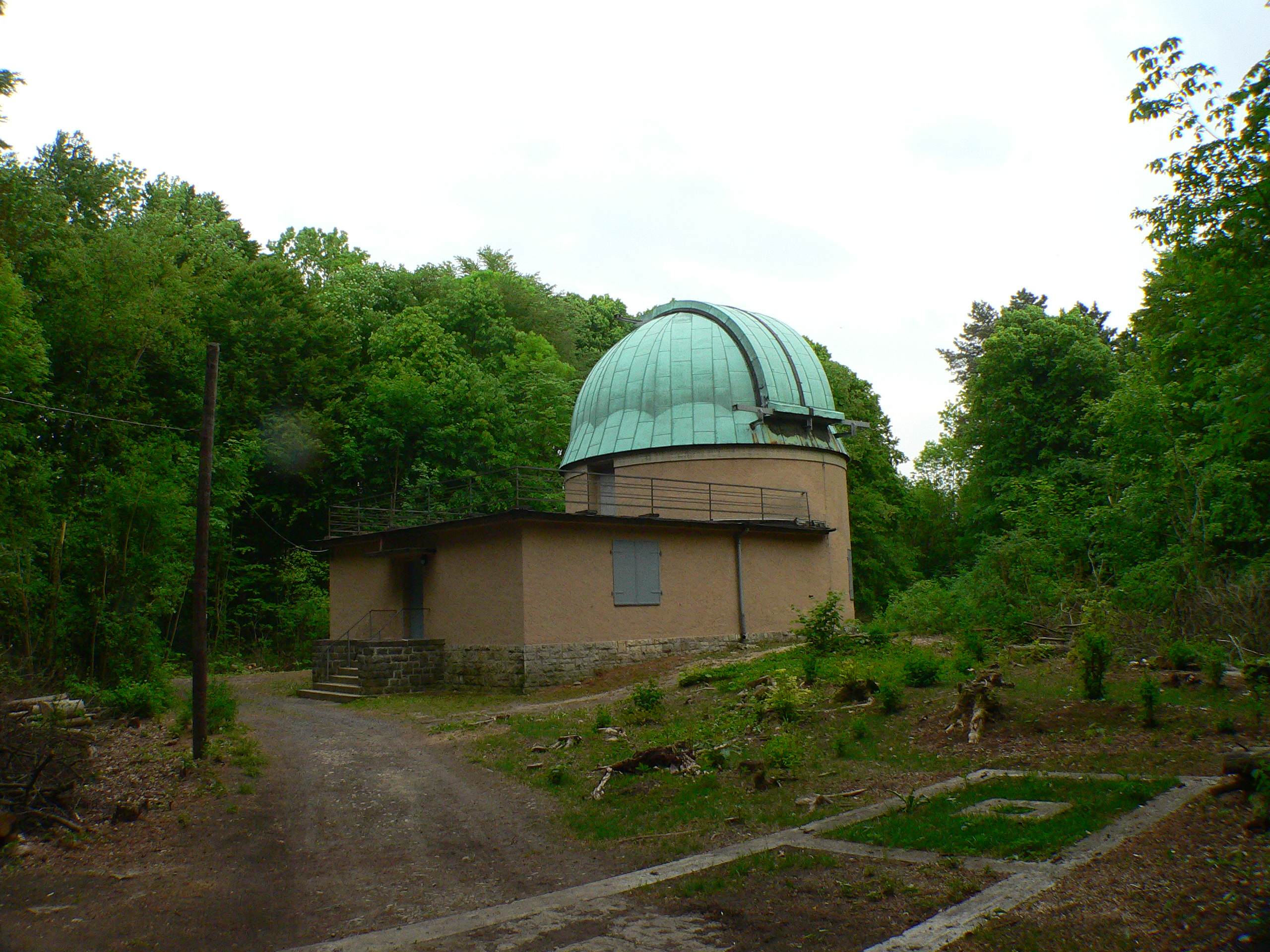 Sternwarte in Göttingen